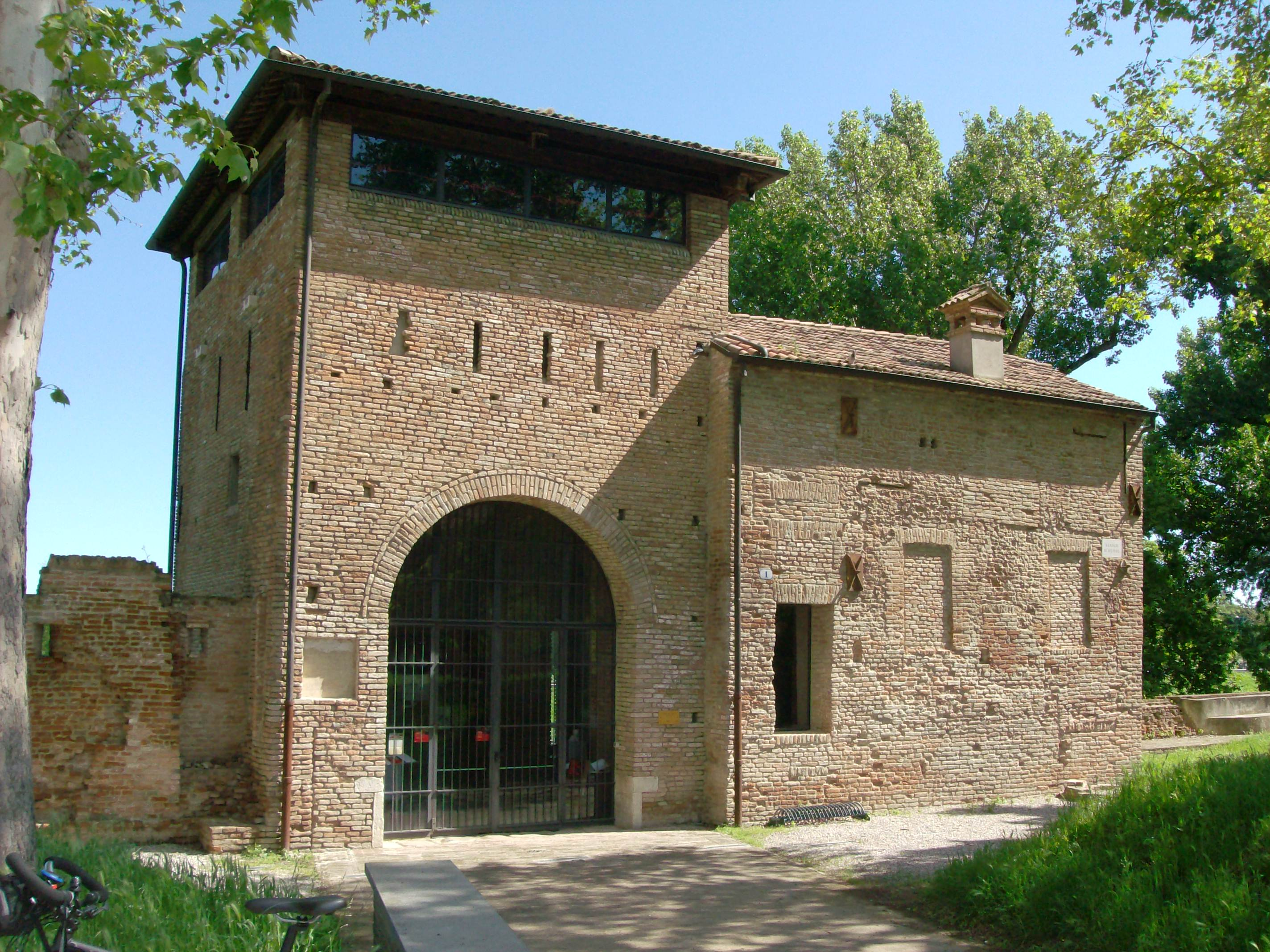 Porta degli Angeli a Ferrara XVI secolo